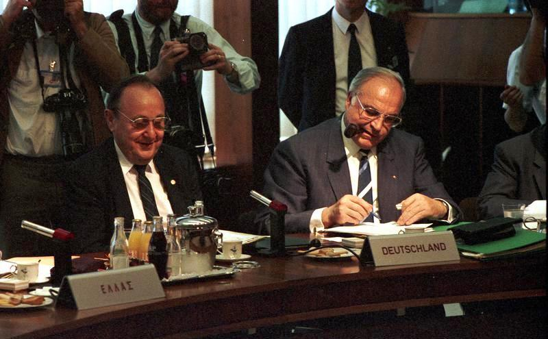 29-30.6.87 Tagung des Europäischen Rates unter Vorsitz des belgischen Ministerpräsidenten Wilfried Martens mit Bundeskanzler Kohl und Bundesminister im Auswärtigen Amt Hans-Dietrich Genscher in Brüssel. 29.6.1987 Familienfoto der Regierungschefs und der Aussenminister anläßlich eines Mittagessens, gegeben von König Baudouin, im Königspalast.